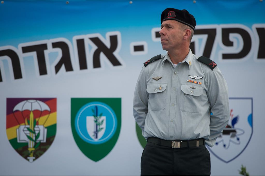 טקס חילופי מפקד עוצבת געש הנערך במחנה נעורה, המפקד הנכנס ,תא"ל אבי גיל